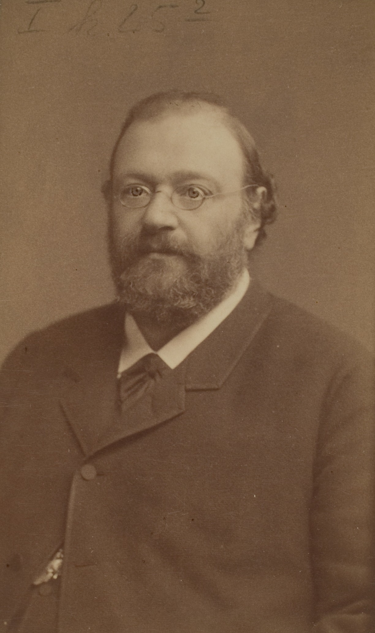 Friedrich Wilhelm Kühne, Physiologe, 1871–1900 Professor in Heidelberg